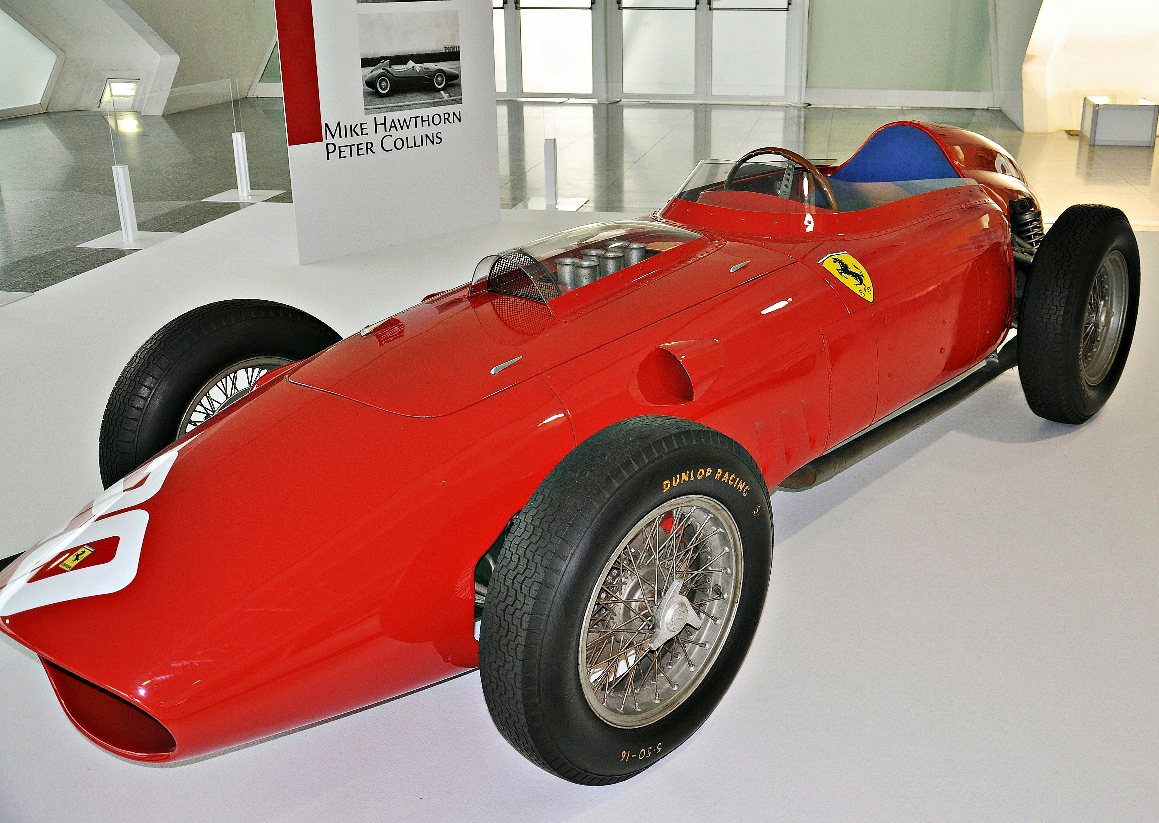 exposicion ferrari en la ciudad de las artes y las ciencias de valencia